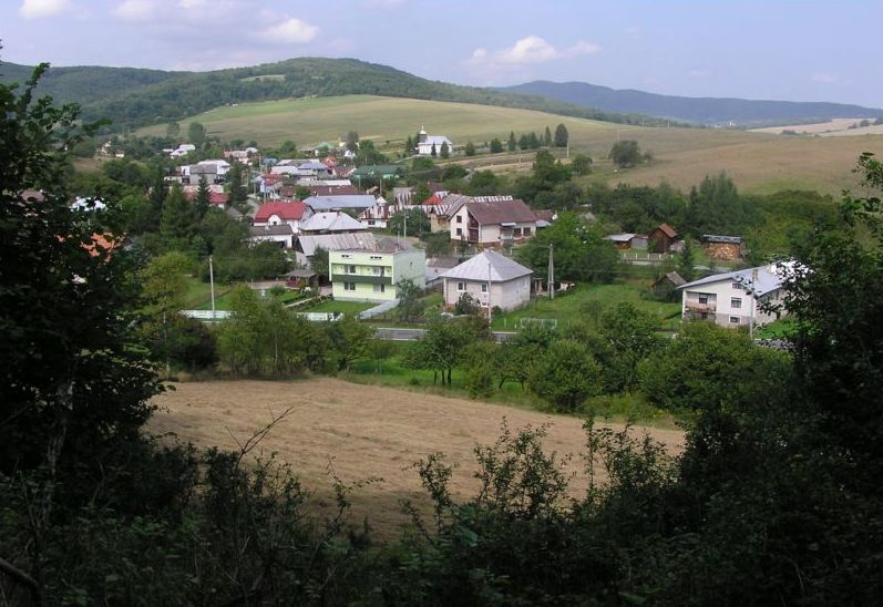 Celkový pohľad